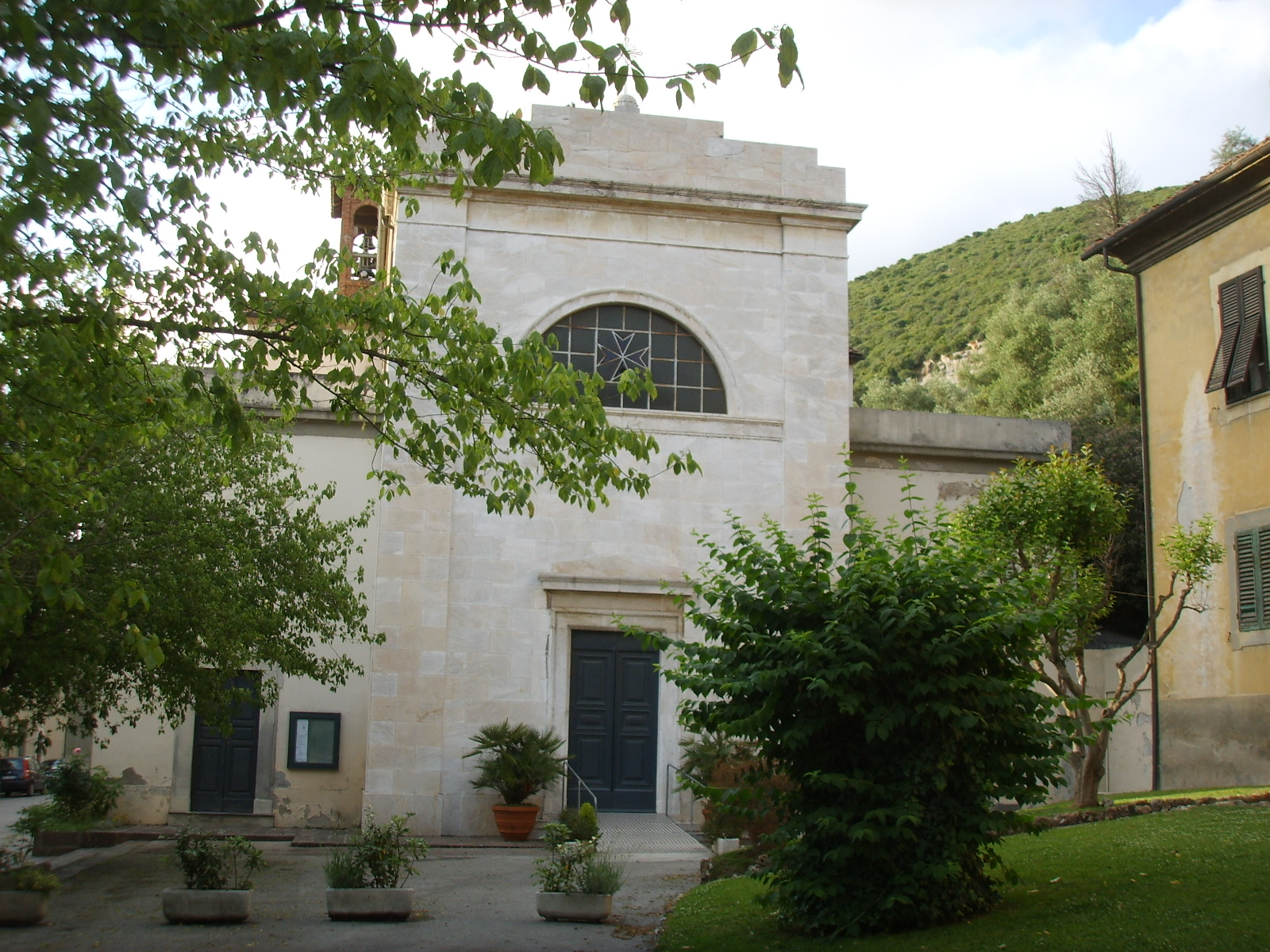 San giuliano terme, chiesa dei santi ranieri e luigi gonzaga